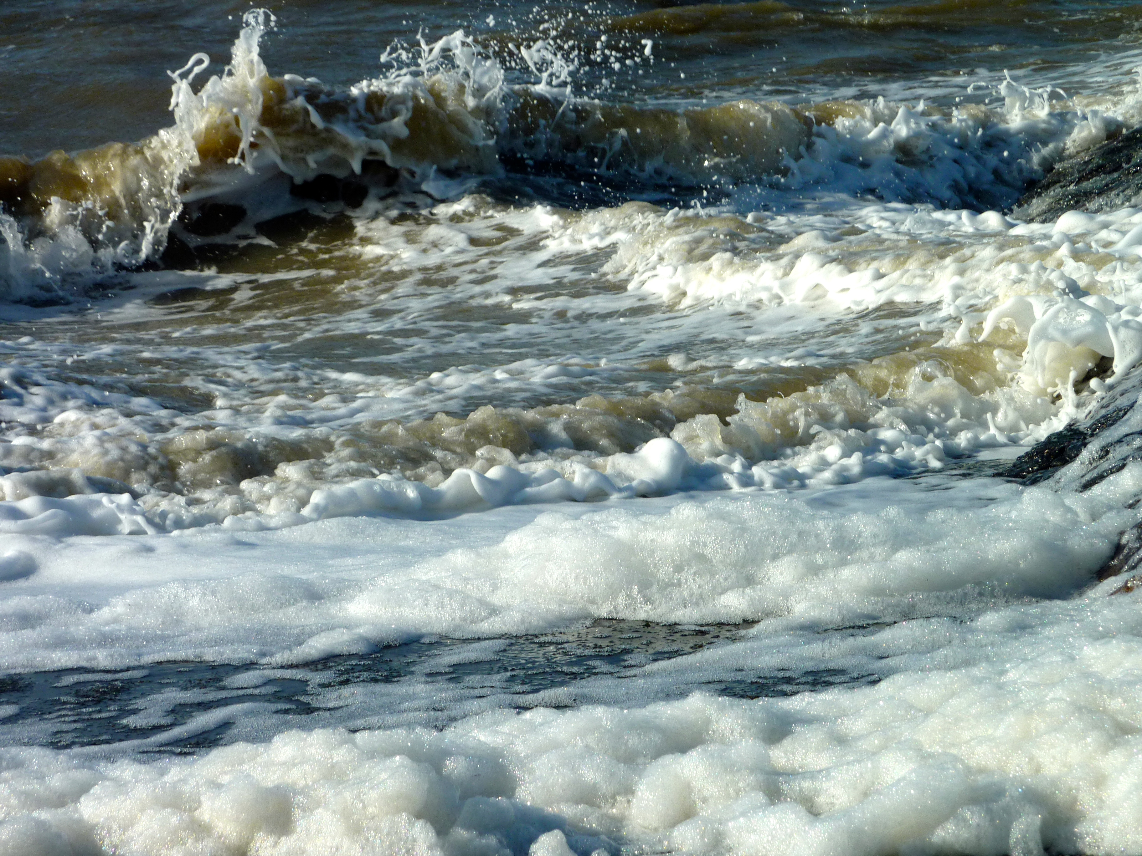 Brandung der Nordsee bei Dagebüll